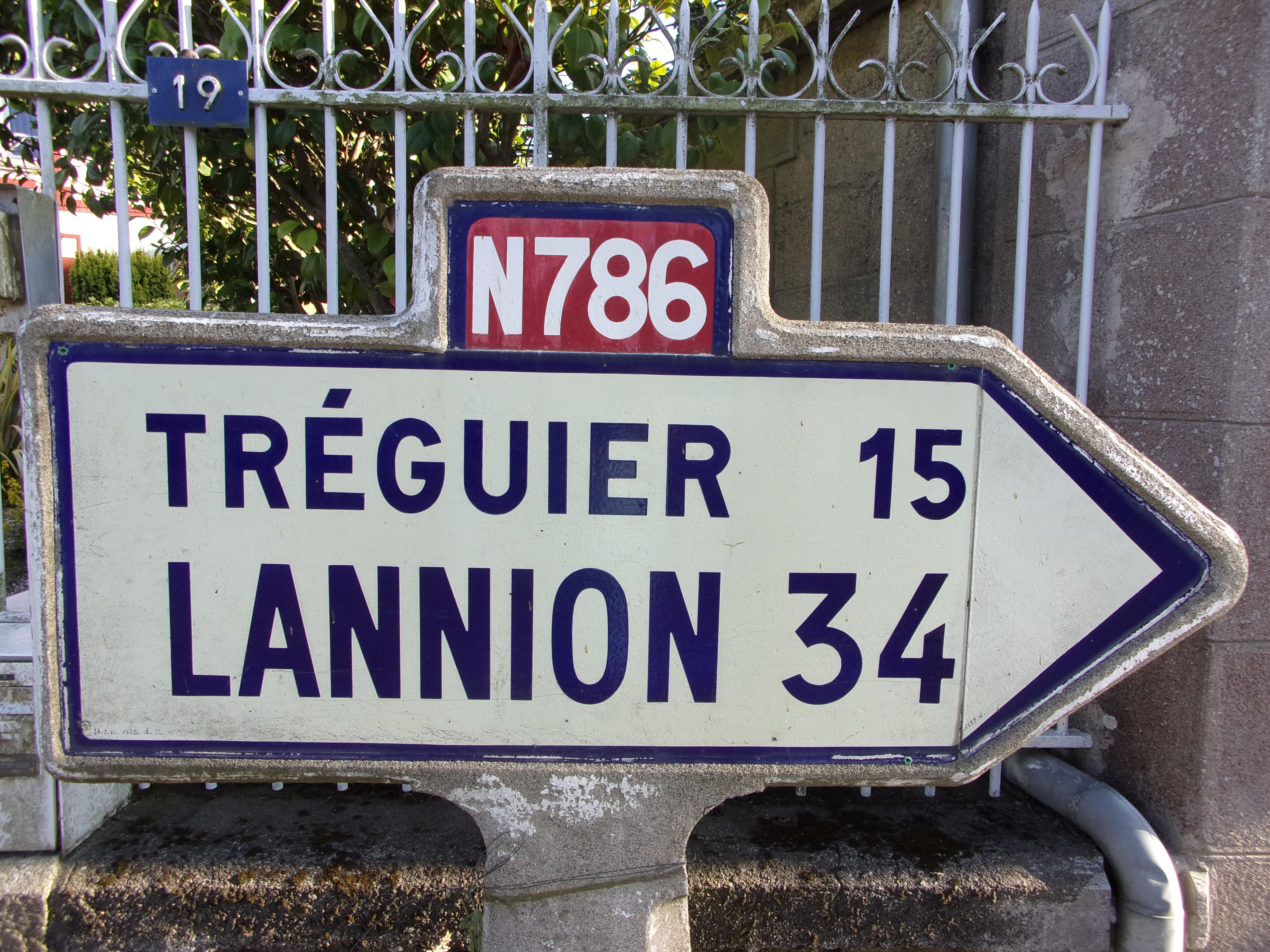 panneau en place à Paimpol